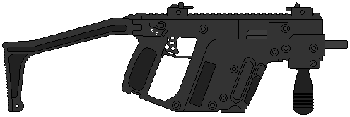 Пистолет-пулемет TDI KRISS Super V